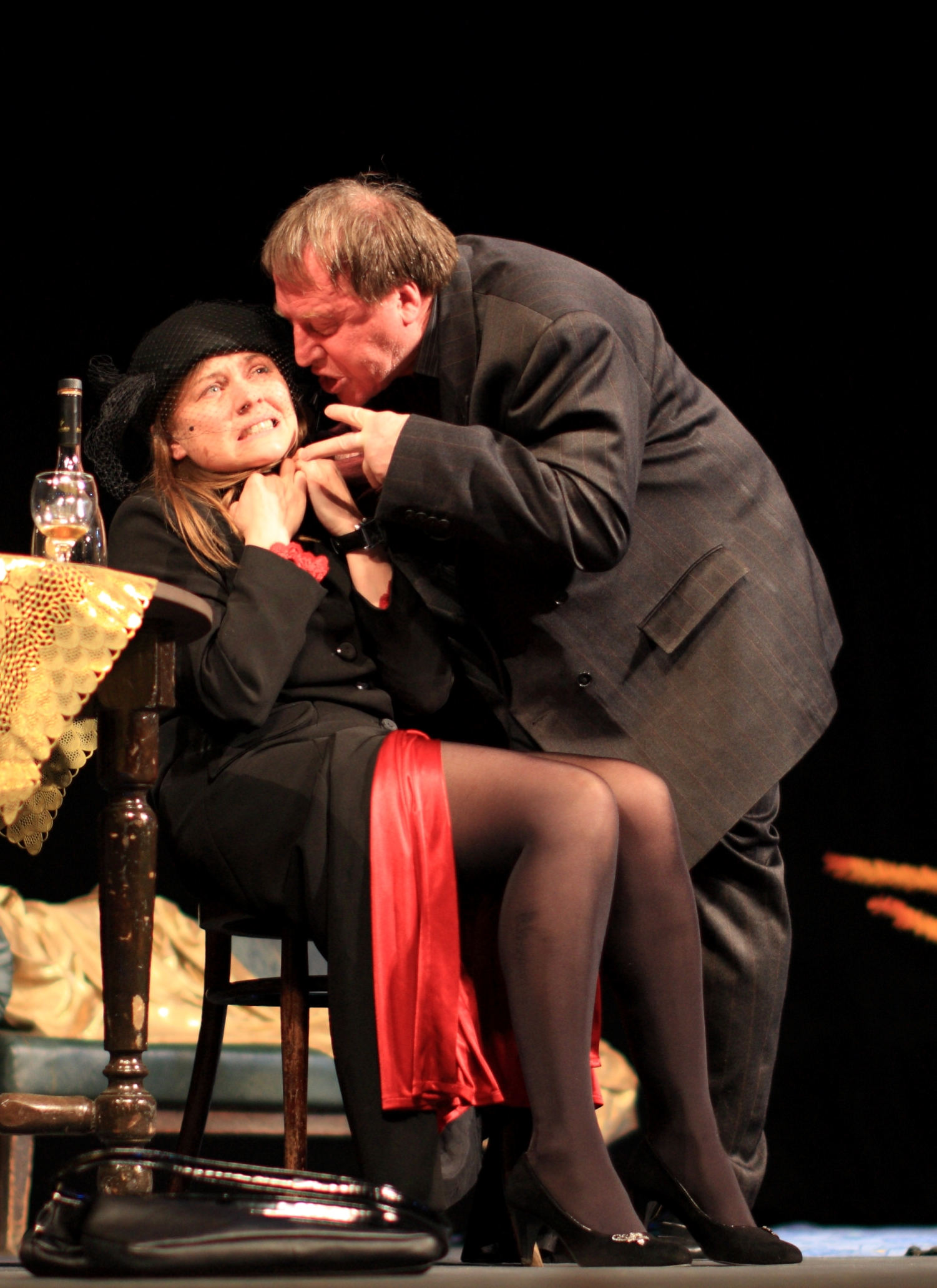 Владимир Стеклов и Мария Голубкина в спектакле «Любовь длинною в ночь» на сцене Северодвинского театра драмы